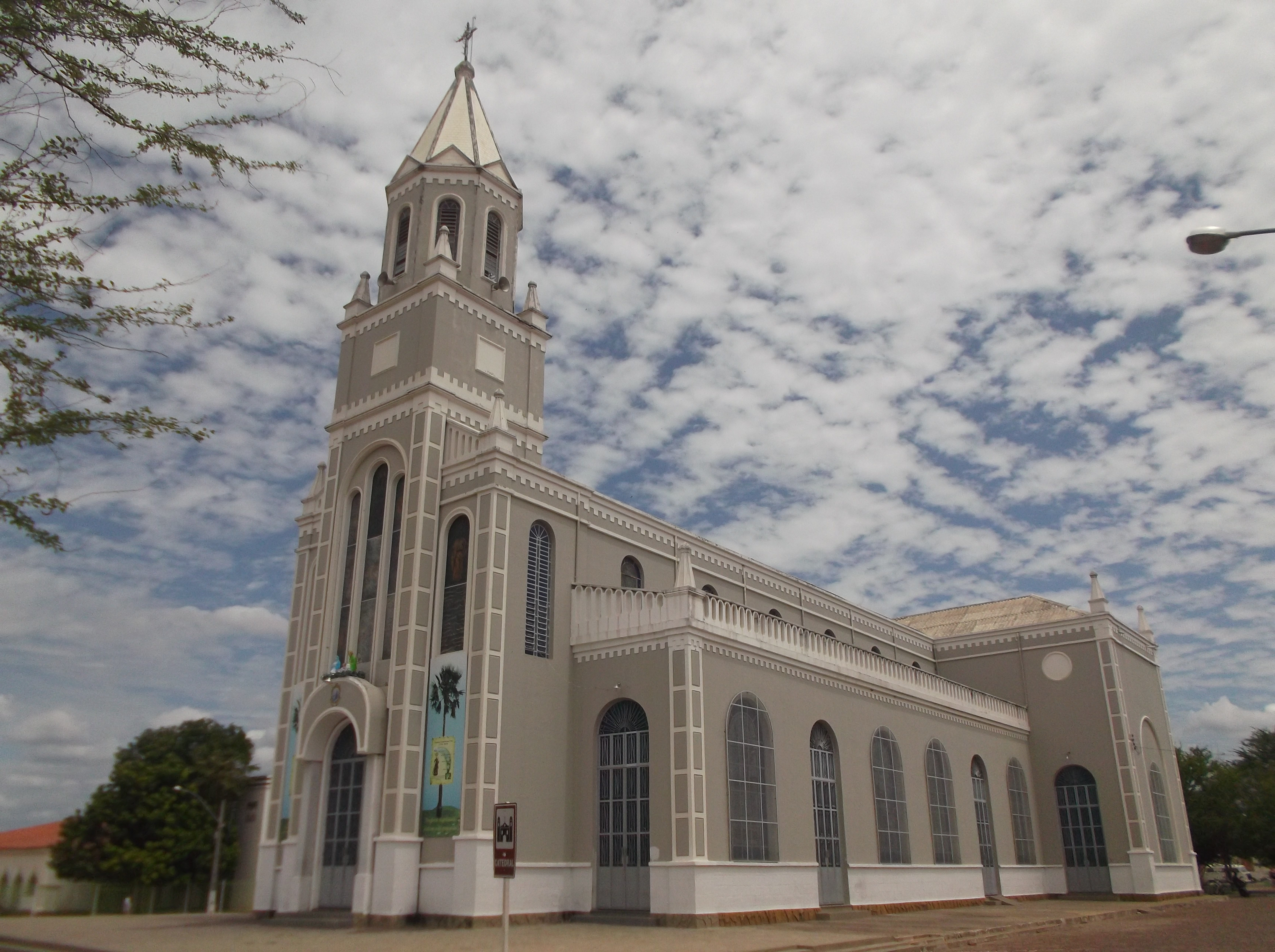 Catedral de Santo Antonio em Campo Maior, Piauí.